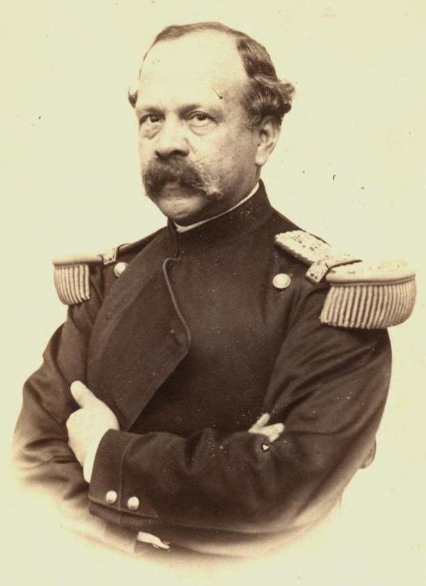 [General José Manuel Pinto] [fotografía] Leslye Hnos. Fotos.